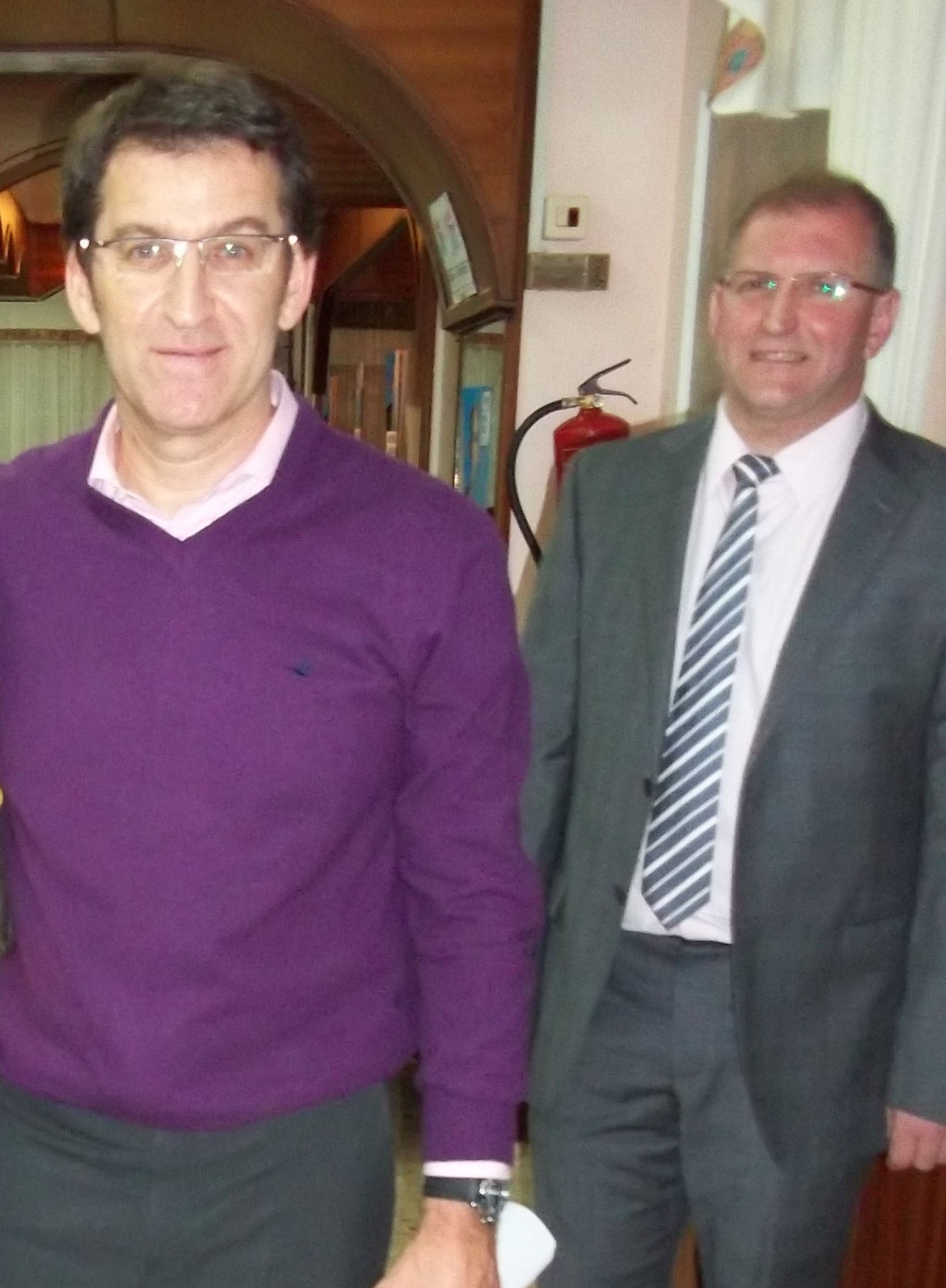 Alcalde de Lousame, Santiago Freire Abeijon co Presidente da Xunta Feijoo